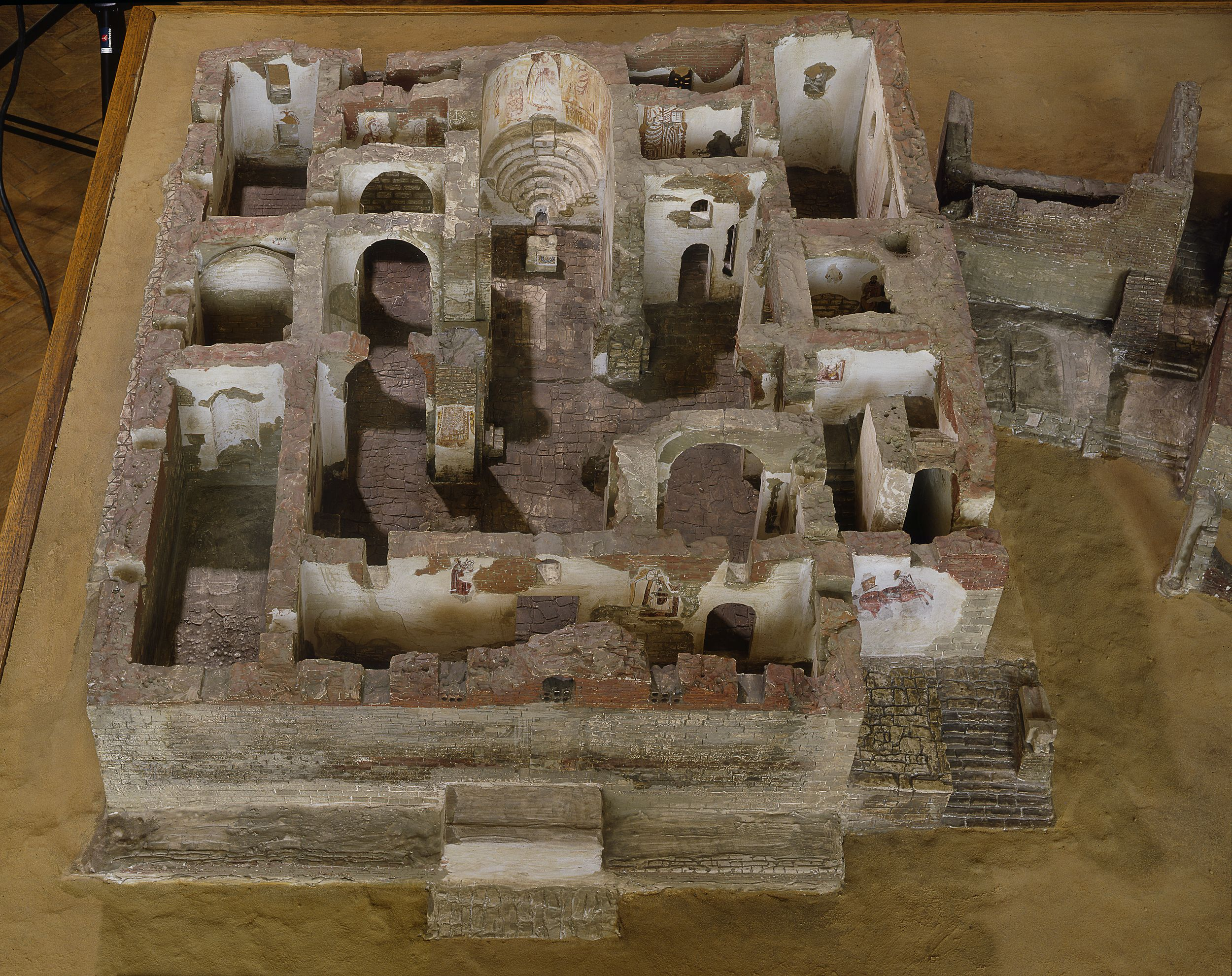 Muzeum Narodowe w Warszawie, Galeria Faras - makieta katedry